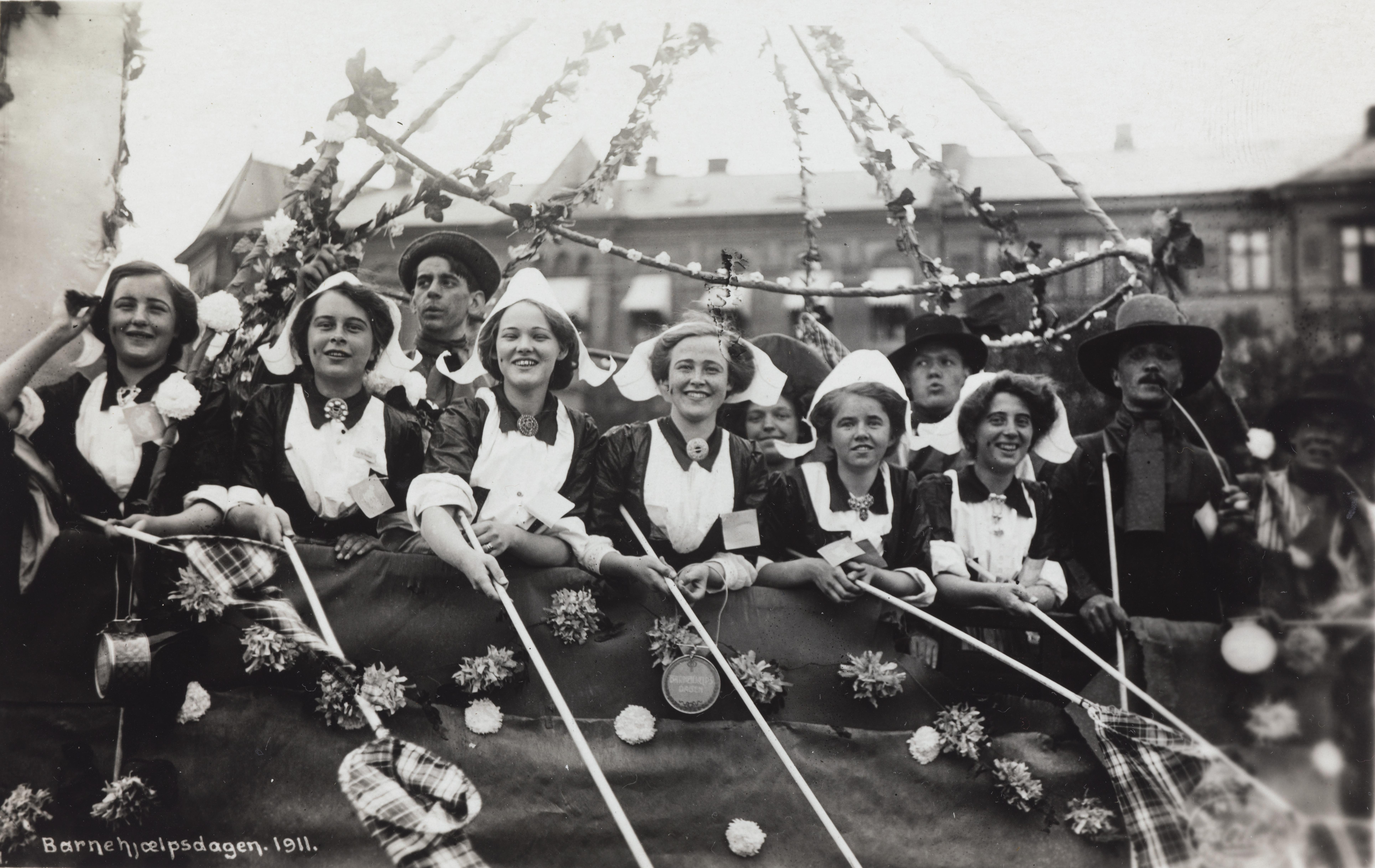 Bildet er hentet fra Nasjonalbibliotekets bildesamling